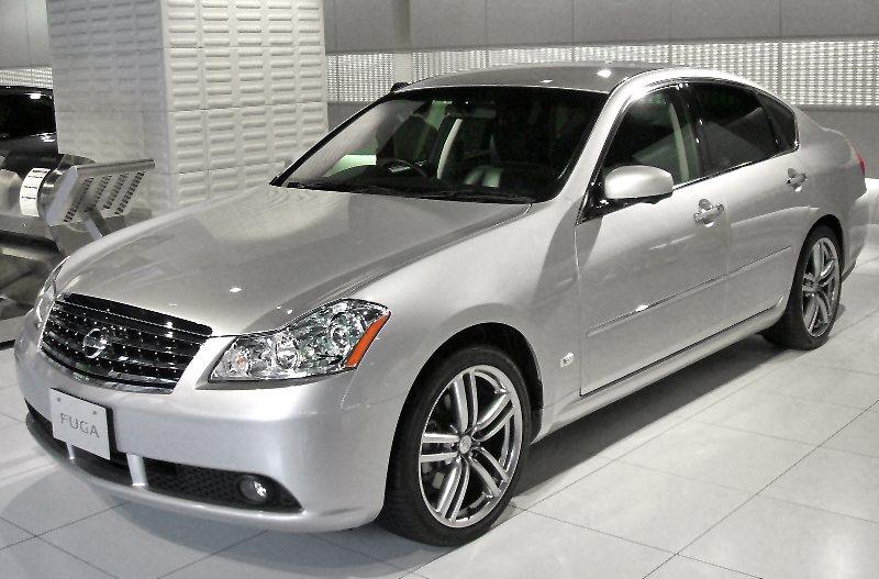 Nissan Fuga 450GT sports package.